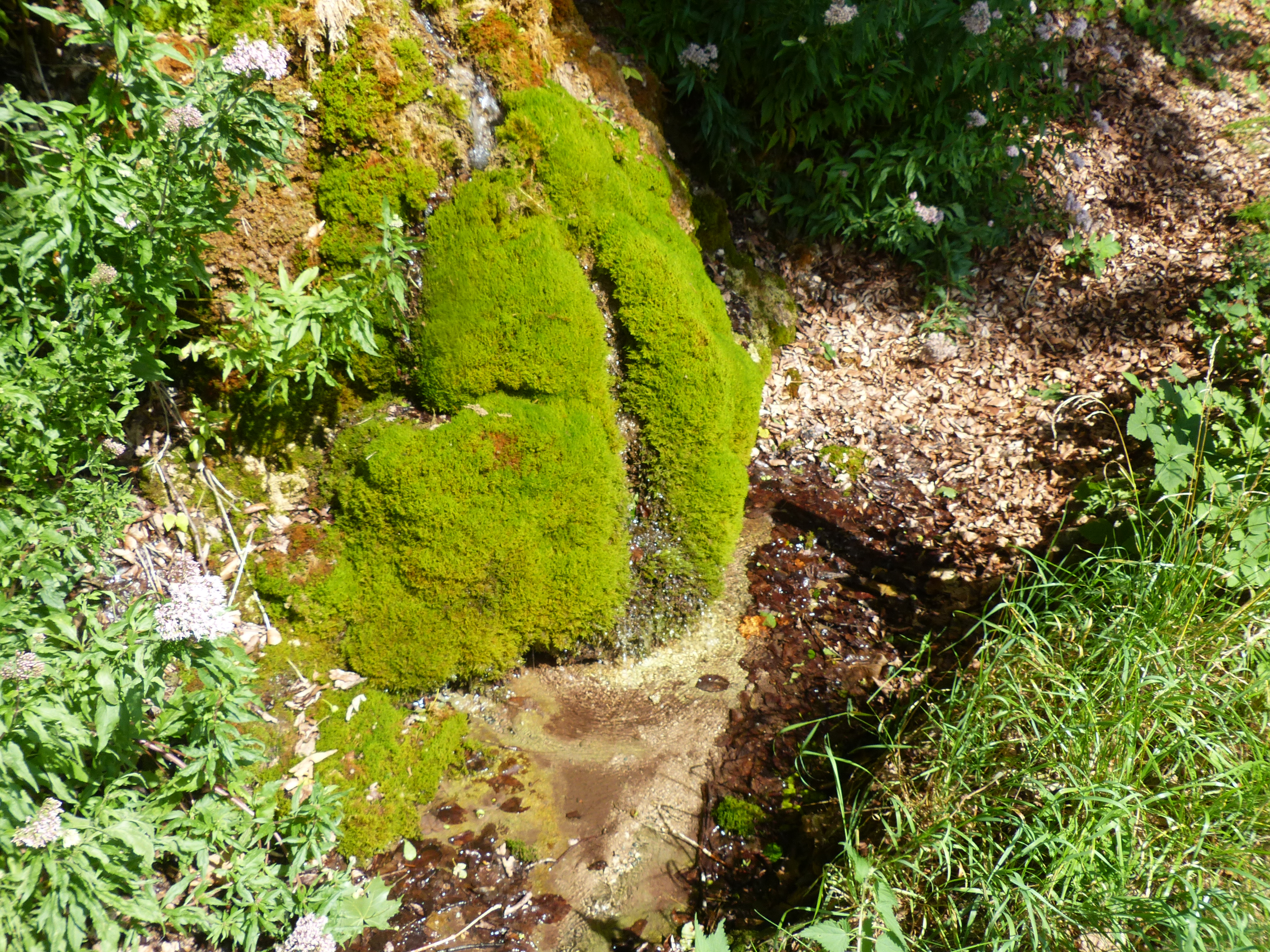 Rinnsal zwischen den beiden Happurger Ortsteilen Thalheim und Förrenbach